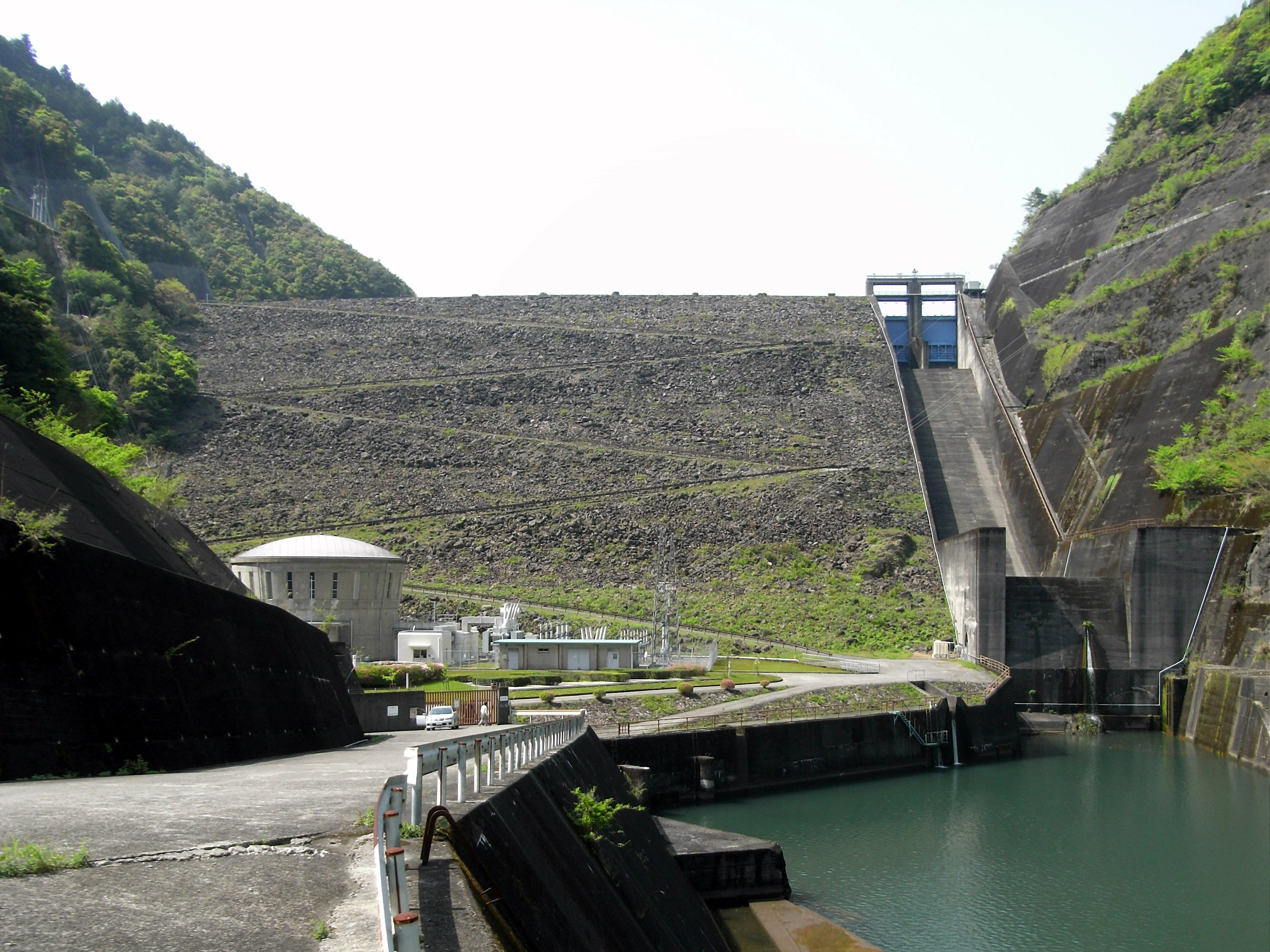 Dam